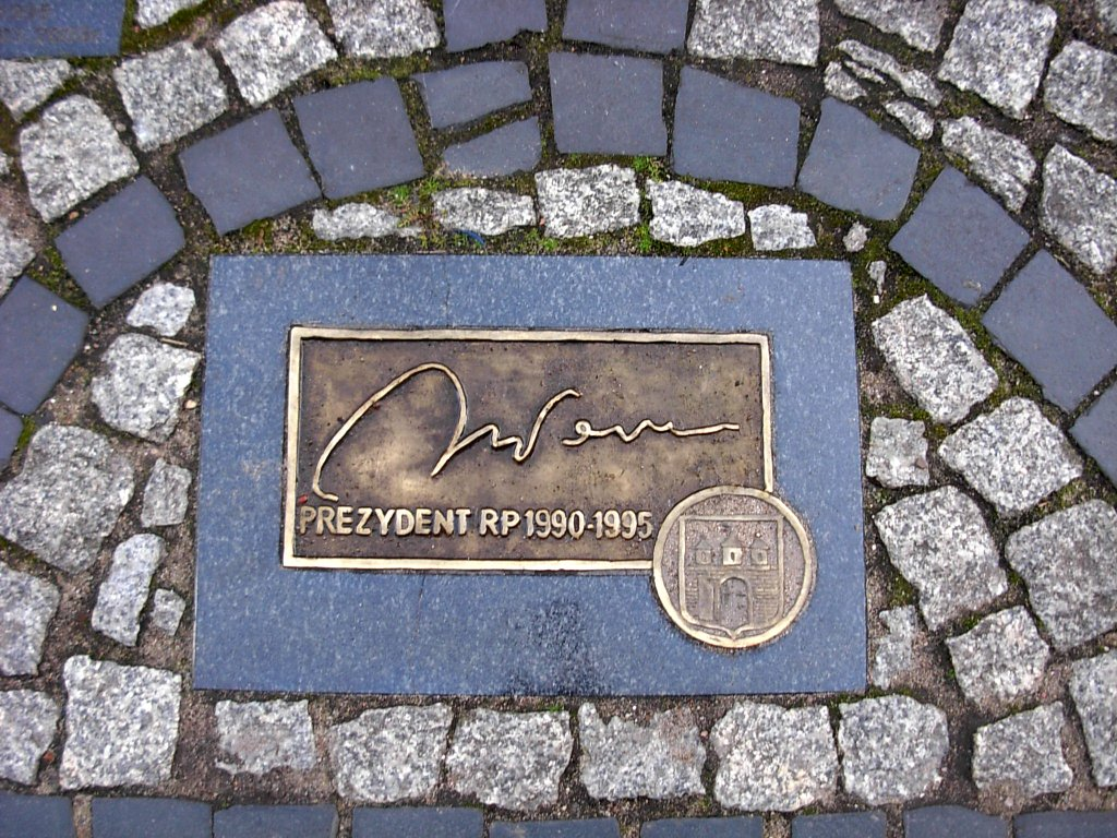 Ulica Długa w Bydgoszczy, Lech Wałęsa